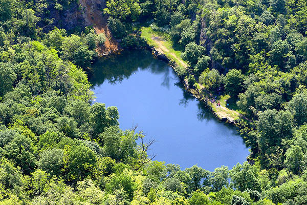 Légi fotó